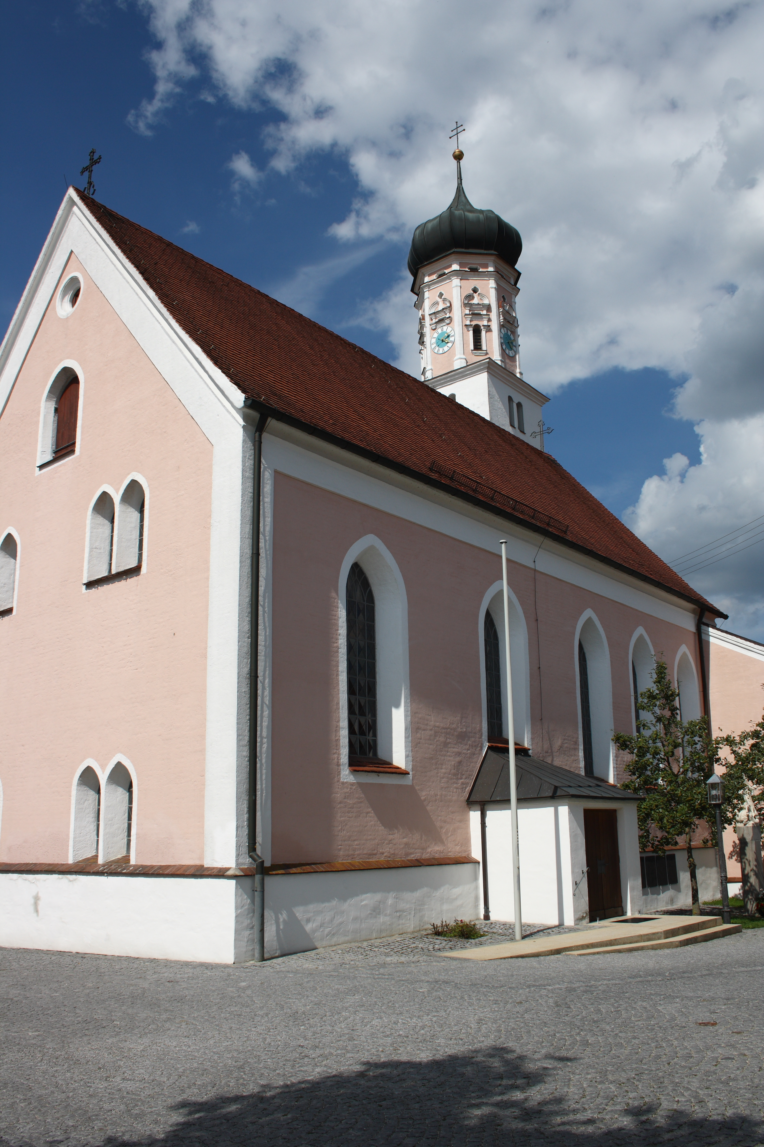 Katholische Pfarrkirche Maria Hilf in Unterthürheim, einem Ortsteil von Buttenwiesen im Landkreis Dillingen an der Donau (Bayern)